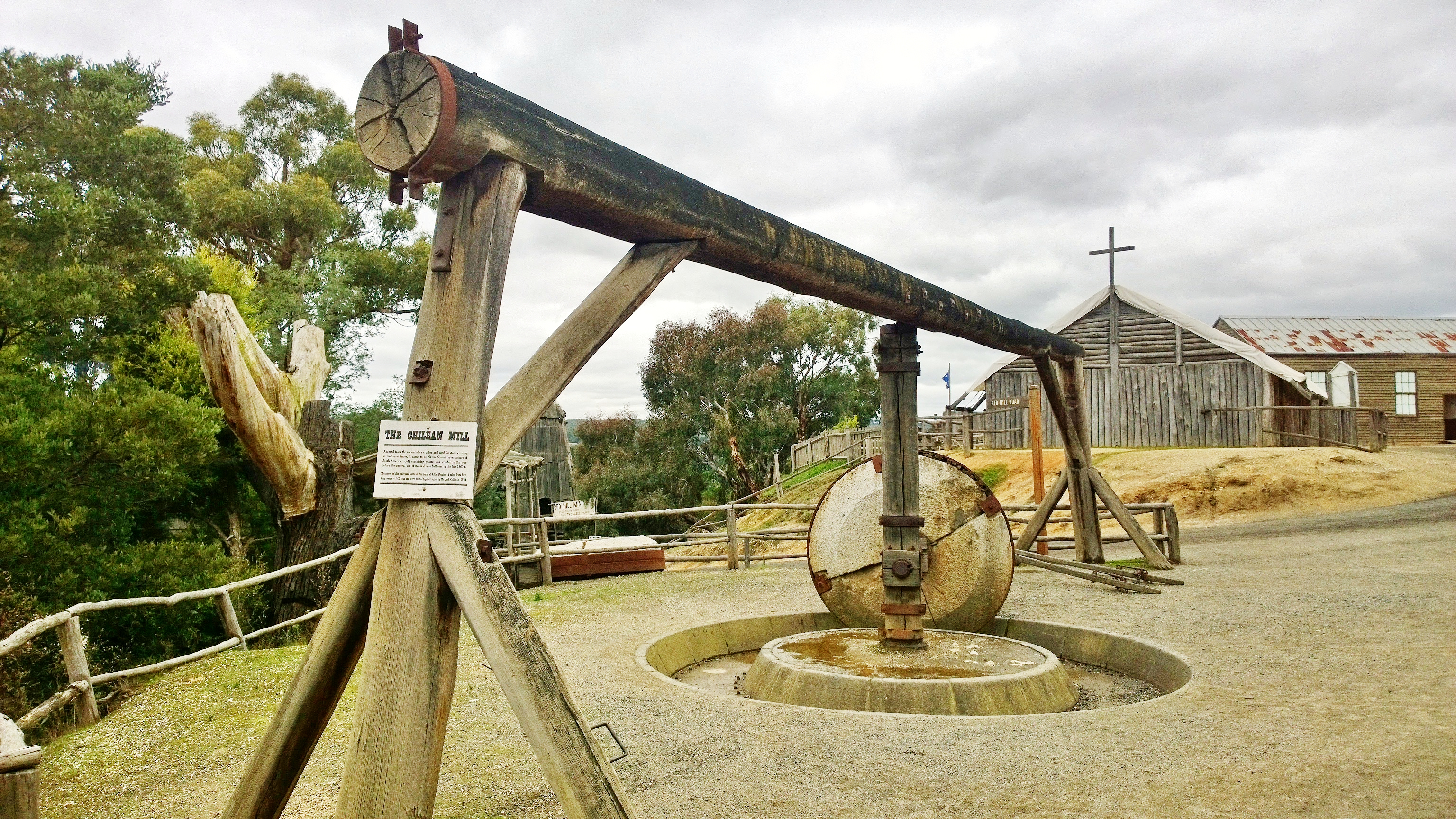 Golden Point VIC 3350, Australia